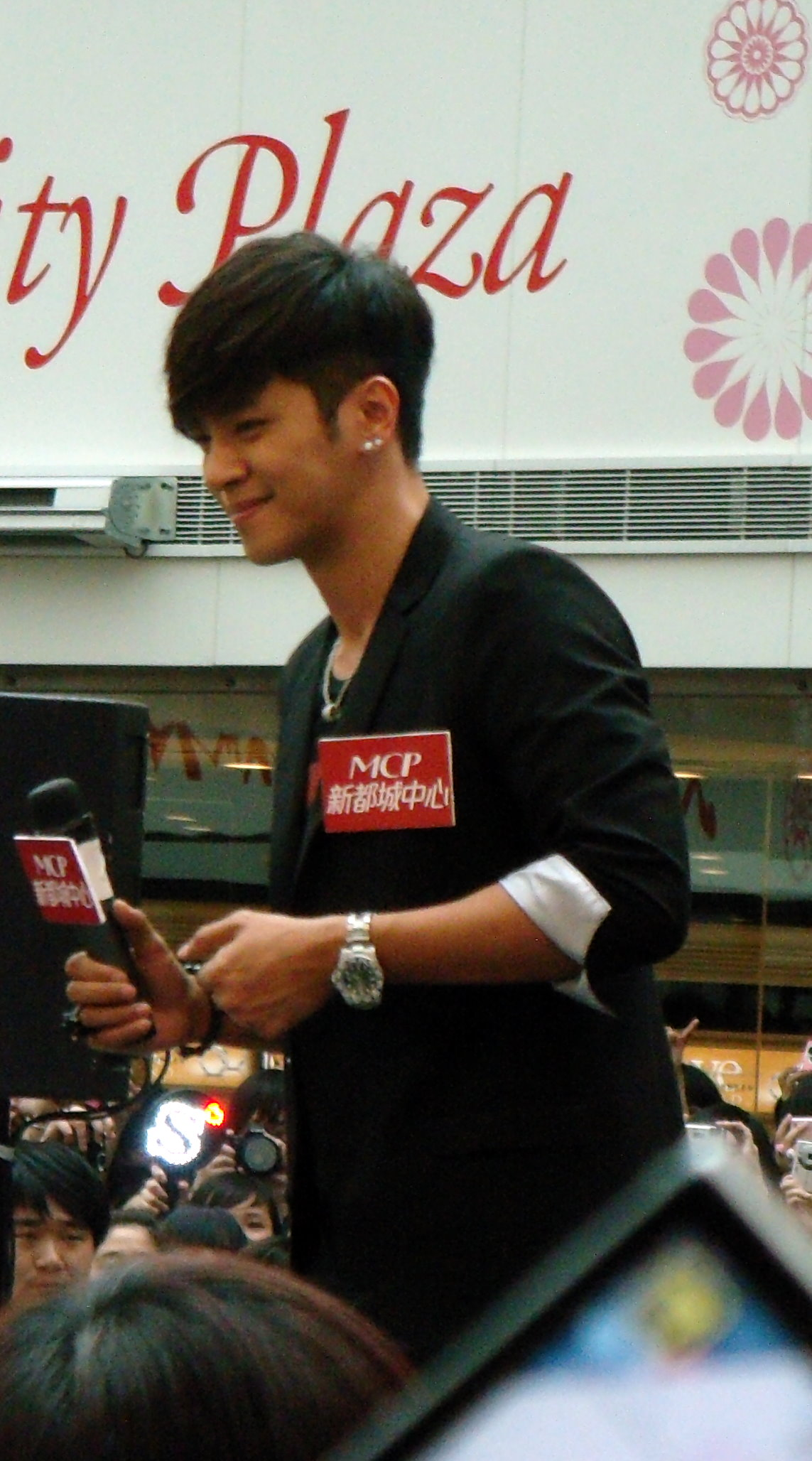 中文（香港）: 2011年03月26日香港獨一無二Only For You 簽唱會